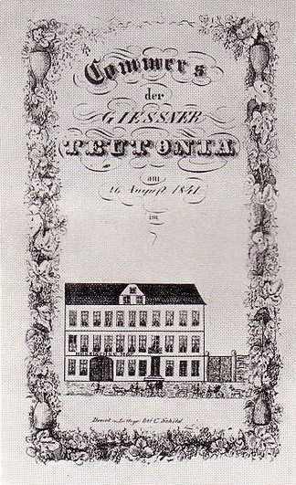 Kommersheft Teutonia Gießen 1841 mit Abbildung des Russischen Hofs in Gießen Zitat aus der Corpsgeschichte: "Das Kneiplokal war in den 40er Jahren mit Unterbrechungen im Russischen Hof".